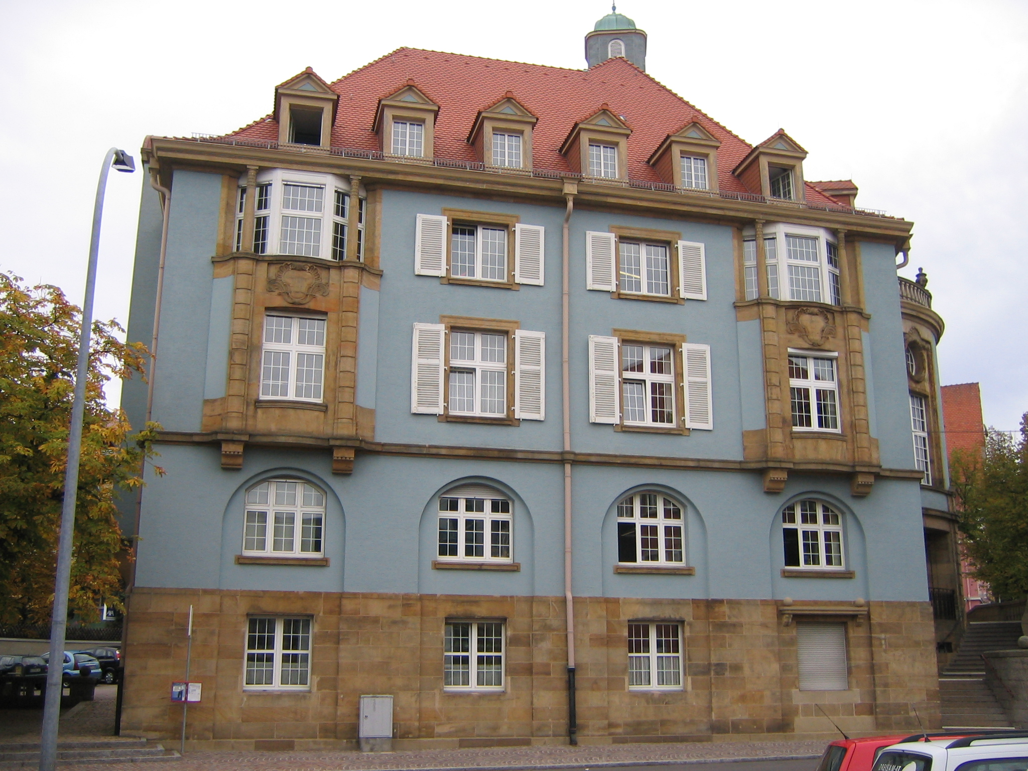 Rathaus von Donaueschingen - Infotafel